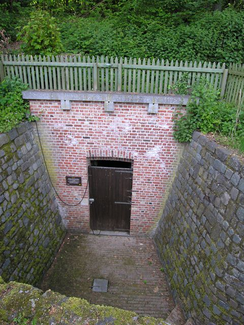 Dilbeek De Heetveldelaan zonder nummer IJskelder